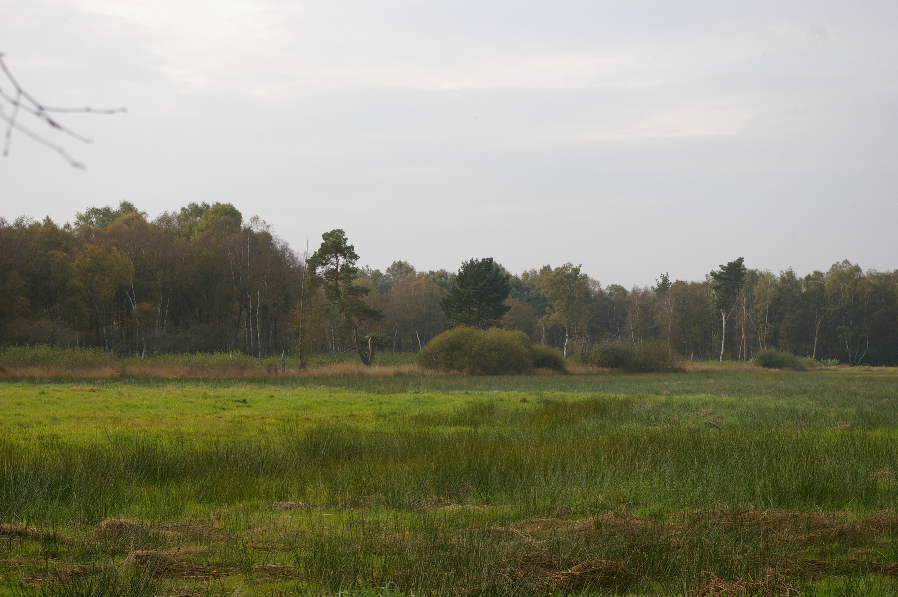 Das Hohe Moor bei Düdinghausen, abgebildeter Bereich im Naturschutzgebiet „Hohes Moor“ bei Kirchdorf in Niedersachsen